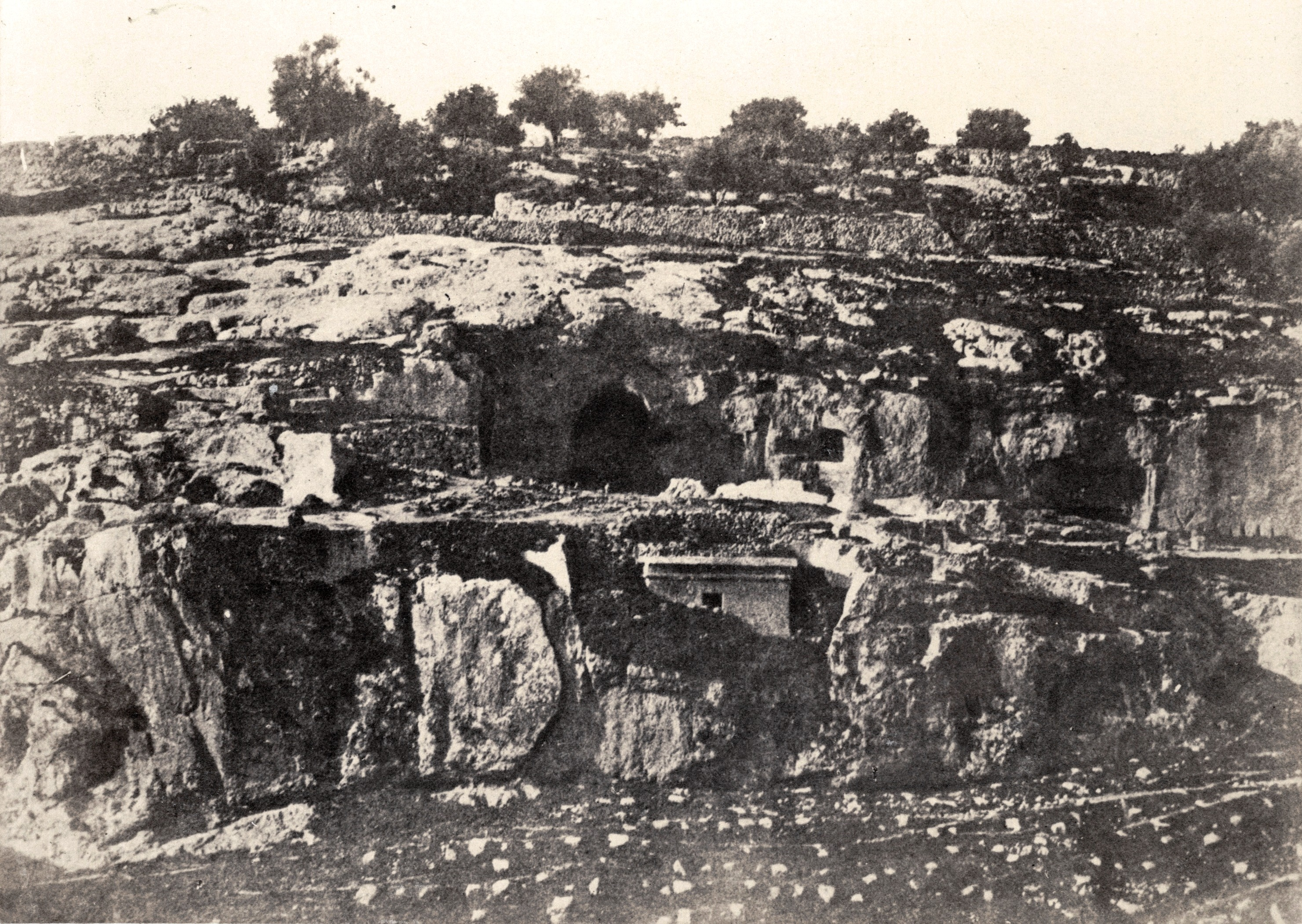 Village de Siloam - Jerusalem.